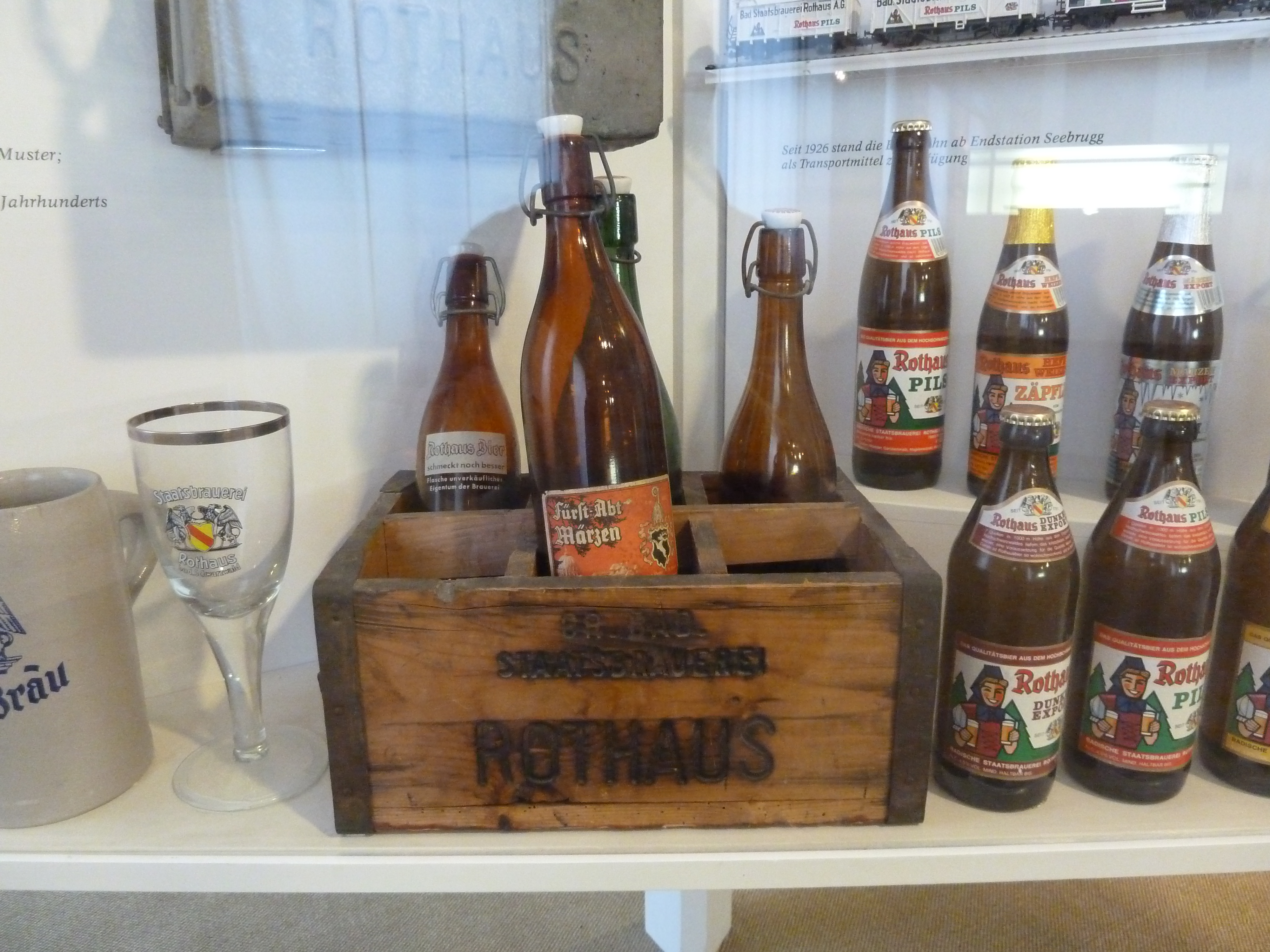 Besuch im Kreismuseum St. Blasien